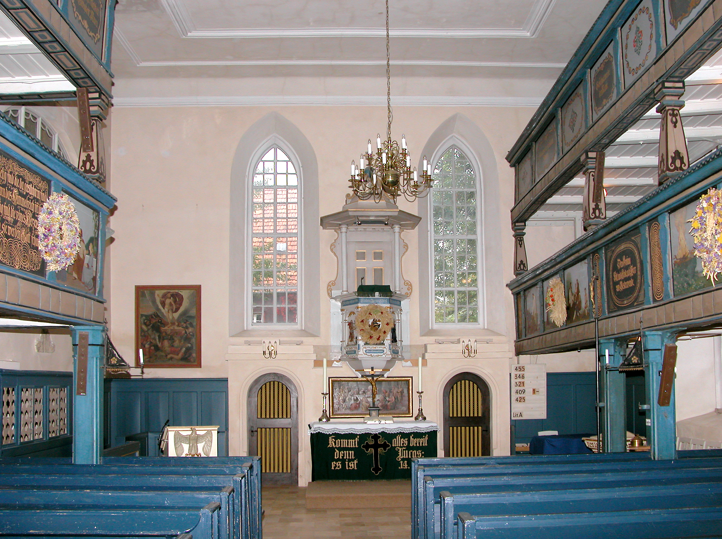 13.10.2006 01108 Dresden-Weixdorf, Lausaer Kirchgasse: Pastor-Roller-Kirche (GMP: 51.151448,13.807856) in Lausa: 1429 gingen die alte Holzkirche in Flammen auf. Danach ist vermutlich der Grundstein zu einer Steinkirche gelegt worden, die den Ursprung der heutigen Kirche bildet. 1811-1815 wirkte hier der durch seine Volksverbundenheit bekannte Pastor Roller. 1912 erfuhr die Kirche ihre jetzige ultramarinfarbige Ausmalung. Die Bilder an den Emporen malte der Lausaer Maler Hermann. Das älteste Bild der Kirche hängt an der linken Vorderseite. Es ist ein Auferstehungsbild, gezeichnet mit JACOB DEPUNDER / Ao 1572. Das Altarbild ist eine Abendmahlsdarstellung aus der Zeit um 1660. 1986-1989 Generalreparatur der Kirche. [DSCN12015.TIF]20061013010DR.JPG(c)Blobelt